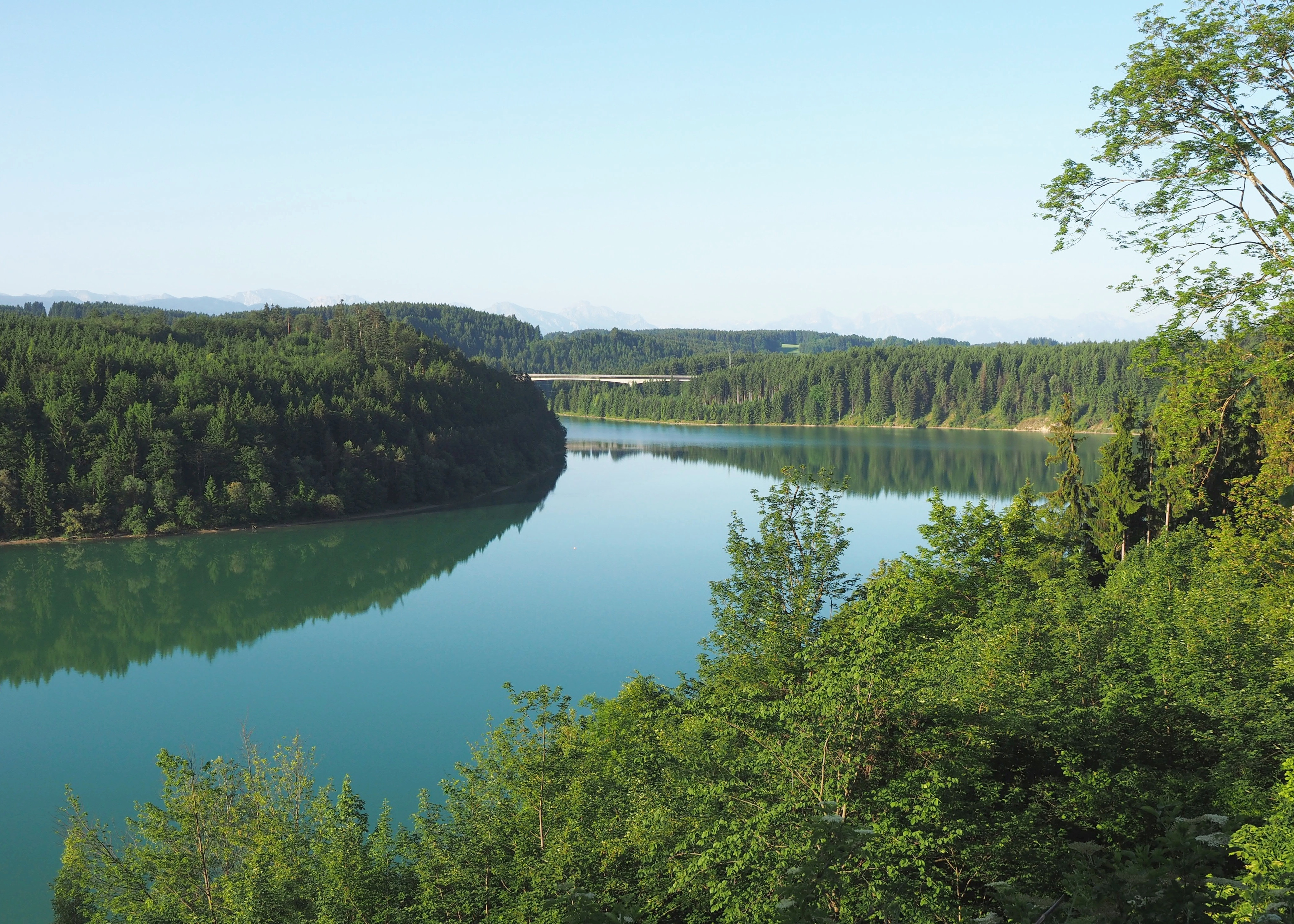 Lechstaustufe 6 von Norden gesehen. Im Hintergrund teilweise verdeckt die Lechtalbrücke Schongau.